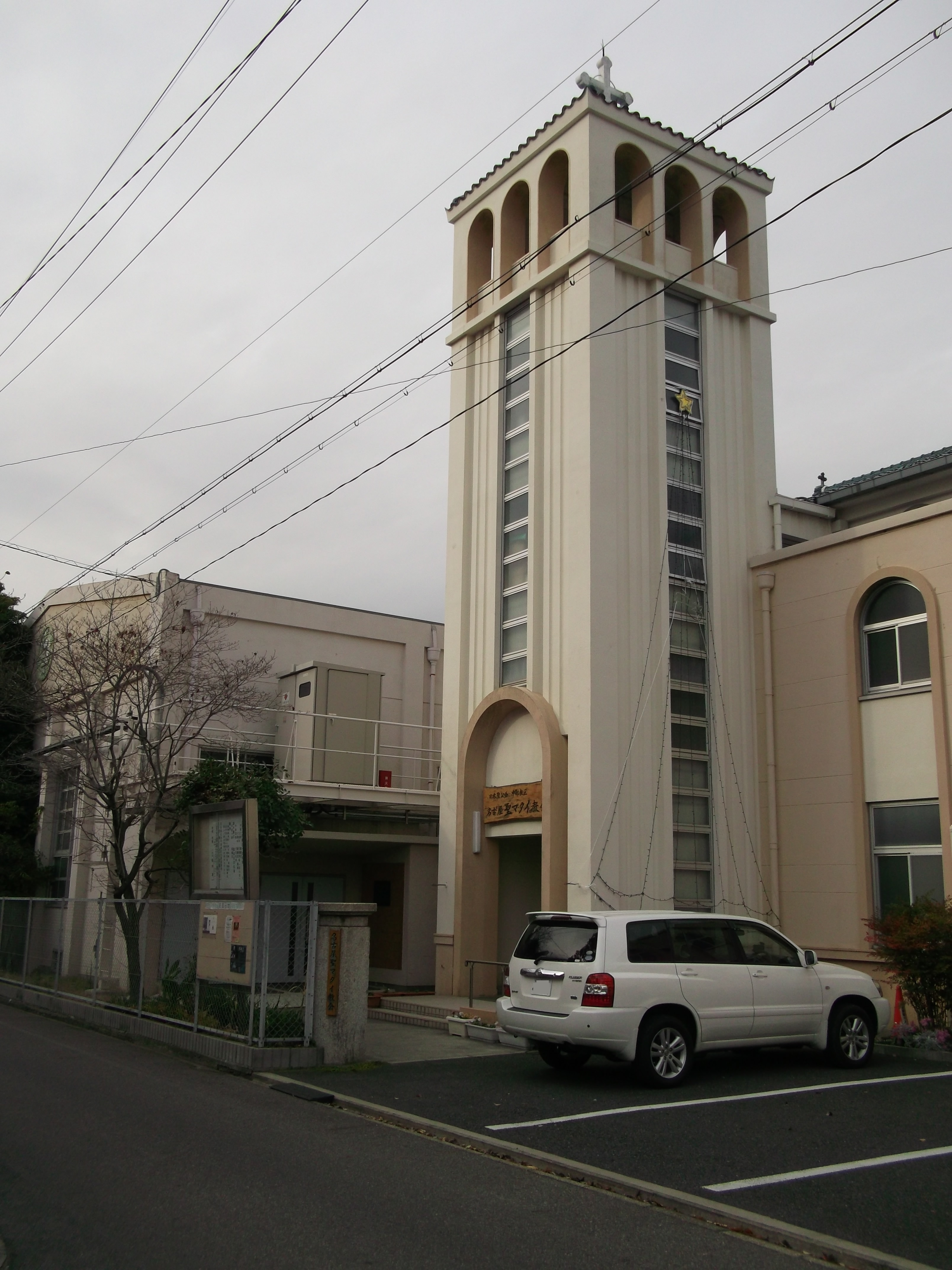 名古屋市昭和区明月町の名古屋聖マタイ教会を南側から写す